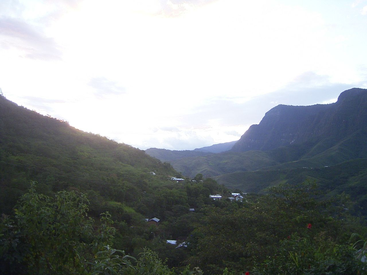 El paisaje al rededor del pueblo Ocumal en el Distrito Ocumal en la Provincia de Luya en la Region Amazonas en el Peru.